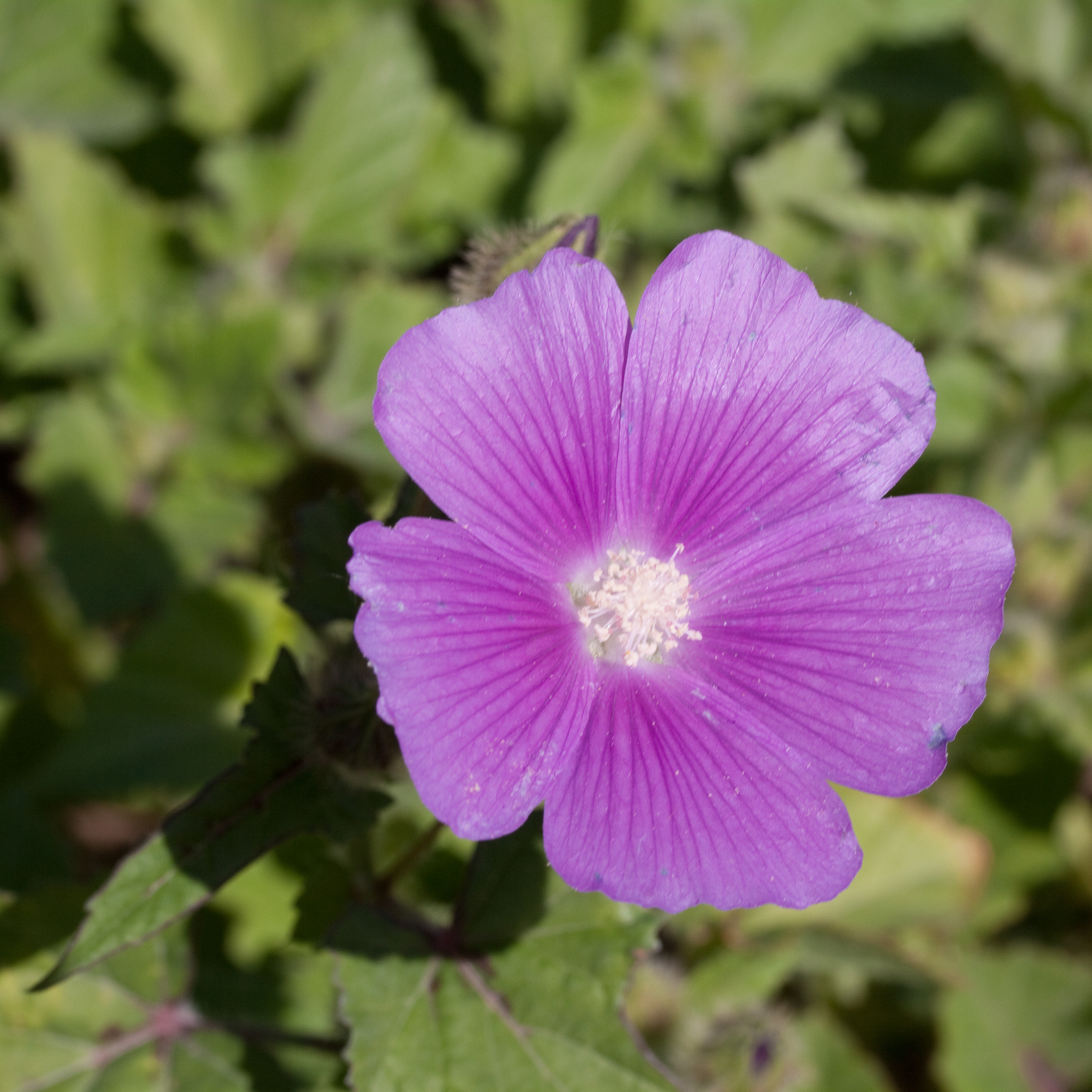 Fleur d'Anoda cristata - Jardin des Plantes - Paris - France